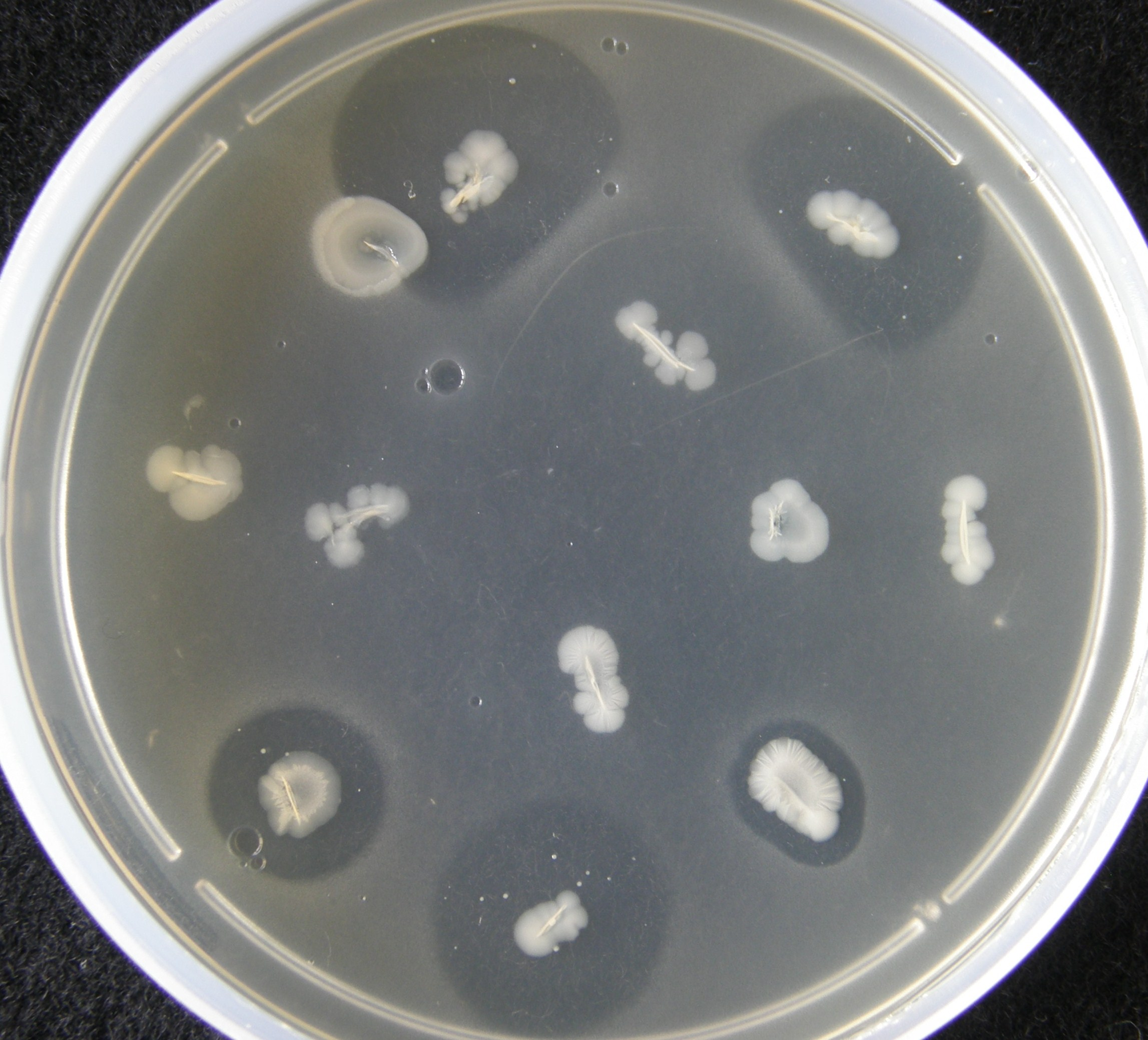 Escherichia coli produkujúce bakteriocíny